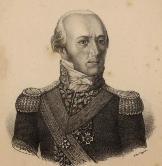 François Goullus (1758-1814), général de brigade et baron de l'Empire.